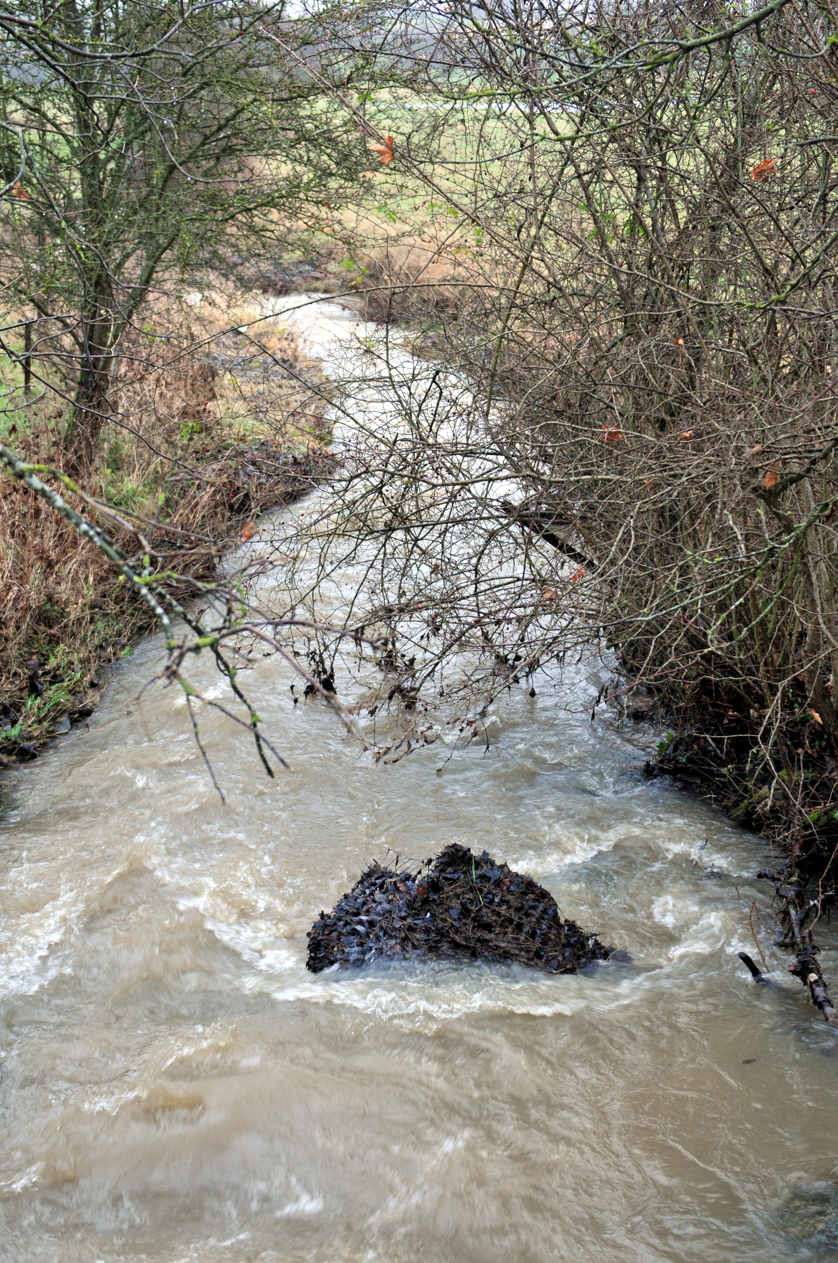 D'Kolerbaach zu Hoen.